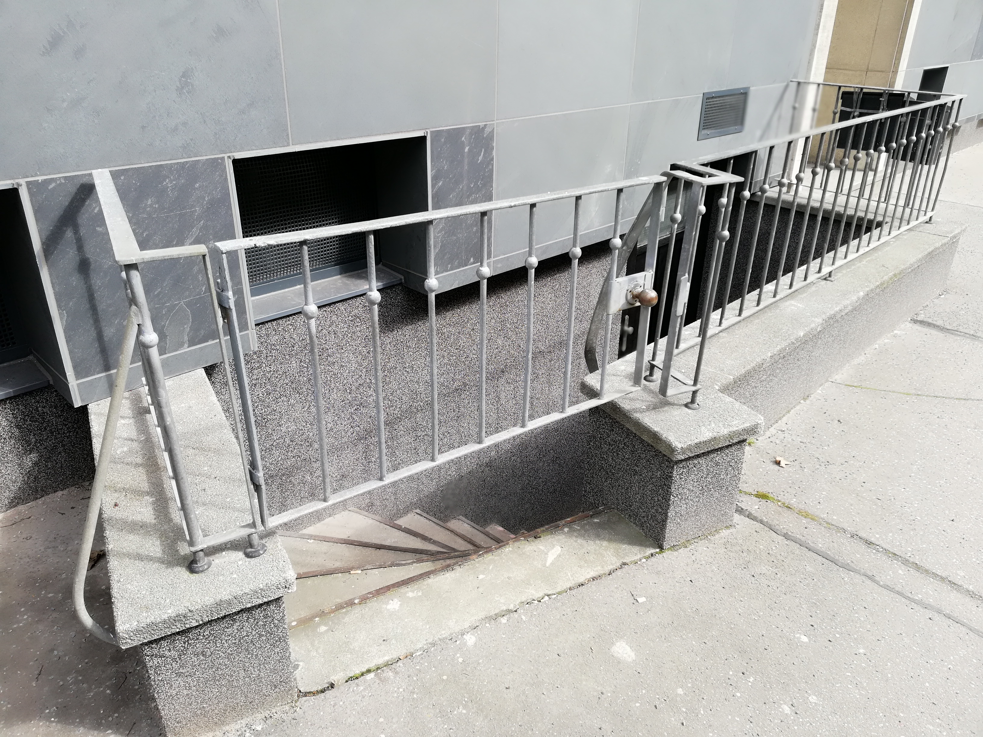 Die erste Moschee in der niedersächsischen Landeshauptstadt, eine sogenannte "Kellermoschee", wurde nach dem 1961 geschlossenen Anwerbeabkommen zwischen der Bundesrepublik Deutschland und der Türkei in einem Kellerraum vom Nebenhaus des damaligen Hotel Körner in der Körnerstraße 5 in Hannover eingerichtet und konnte durch eine eigene, vom Fußweg aus herabführende Treppe betreten werden; siehe auch die Geschichte der Muslime in Hannover ...